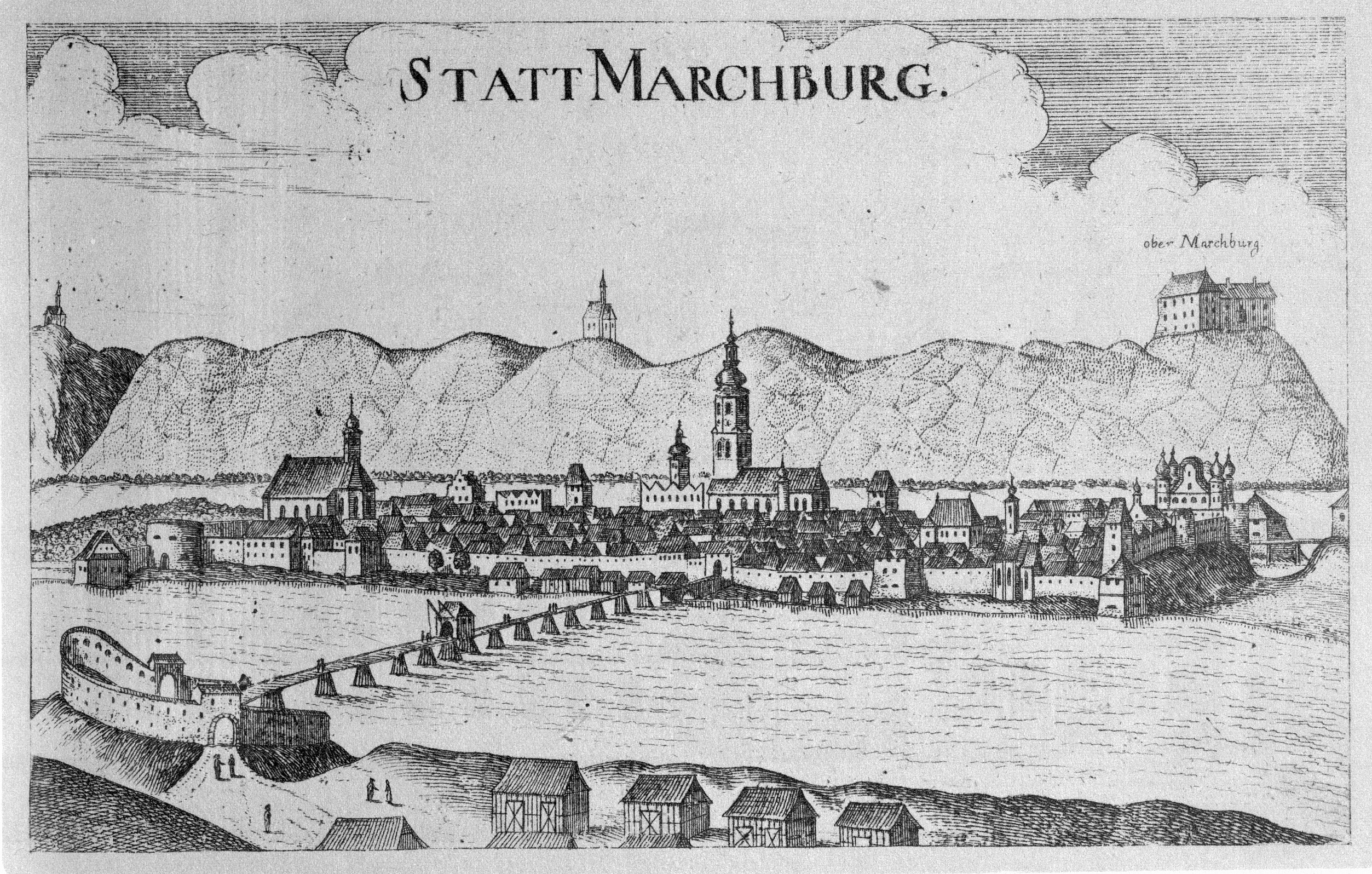 Statt Marchburg, Ljubljana G. M. Vischers Käyserlichen Geographi, Topographia Ducatus Stiriae, Das ist: Eigentliche Delineation / und Abbildung aller Städte / Schlösser / Marcktfleck / Lustgärten / Probsteyen / Stiffter / Clöster und Kirchen / so es sich im Herzogthumb Steyrmarck befinden; Und anjetzo Umb einen billichen Preyß zu finden seynd Bey Johann Bitsch Universitäts Buchhandlern / Auff dem Juden=Platz bey der guldenen Saulen. Graz 1681 Die Nummerierung der Dateien folgt der alphabetischen Reihung der Ortsnamen